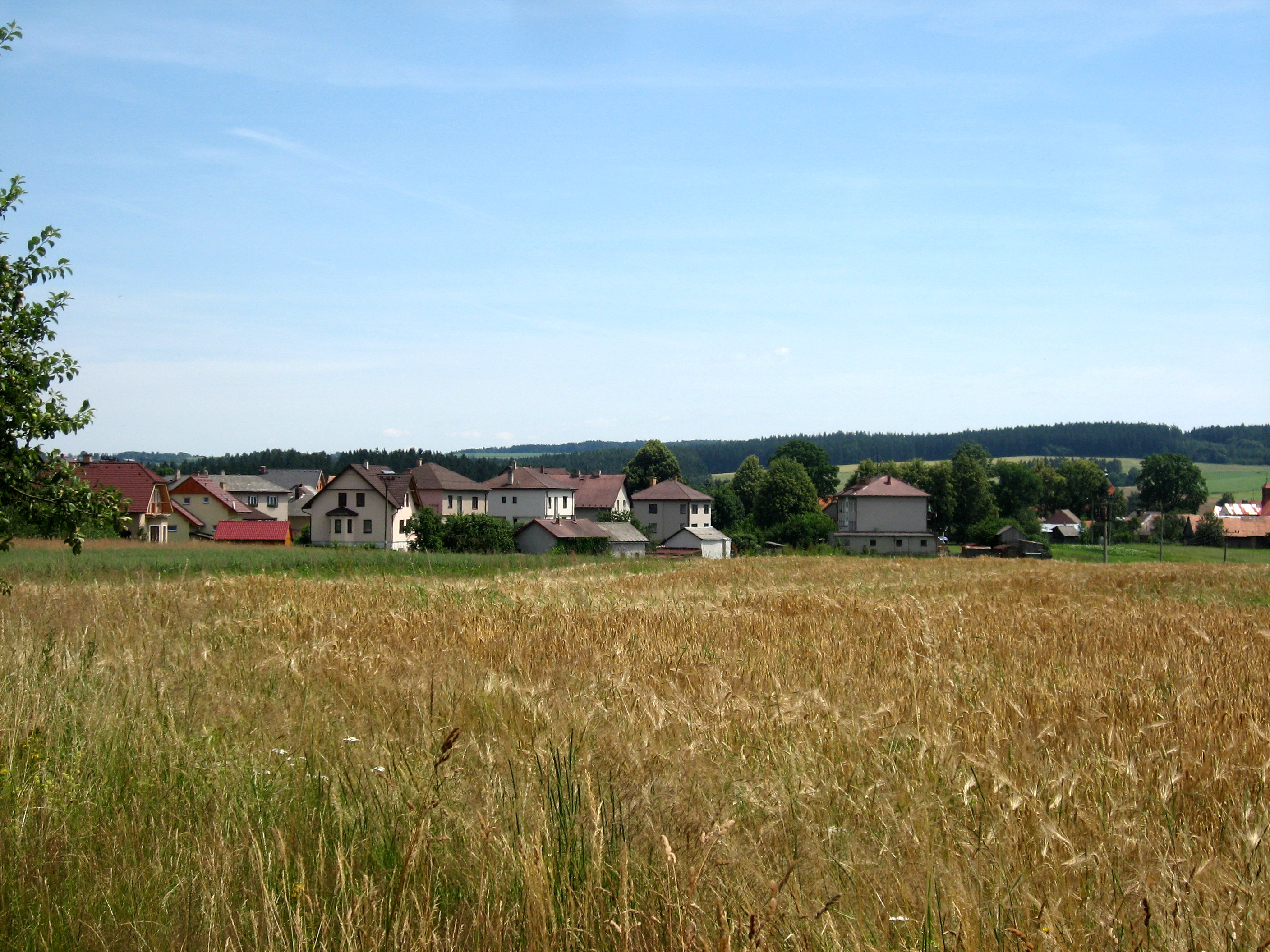 Lučice